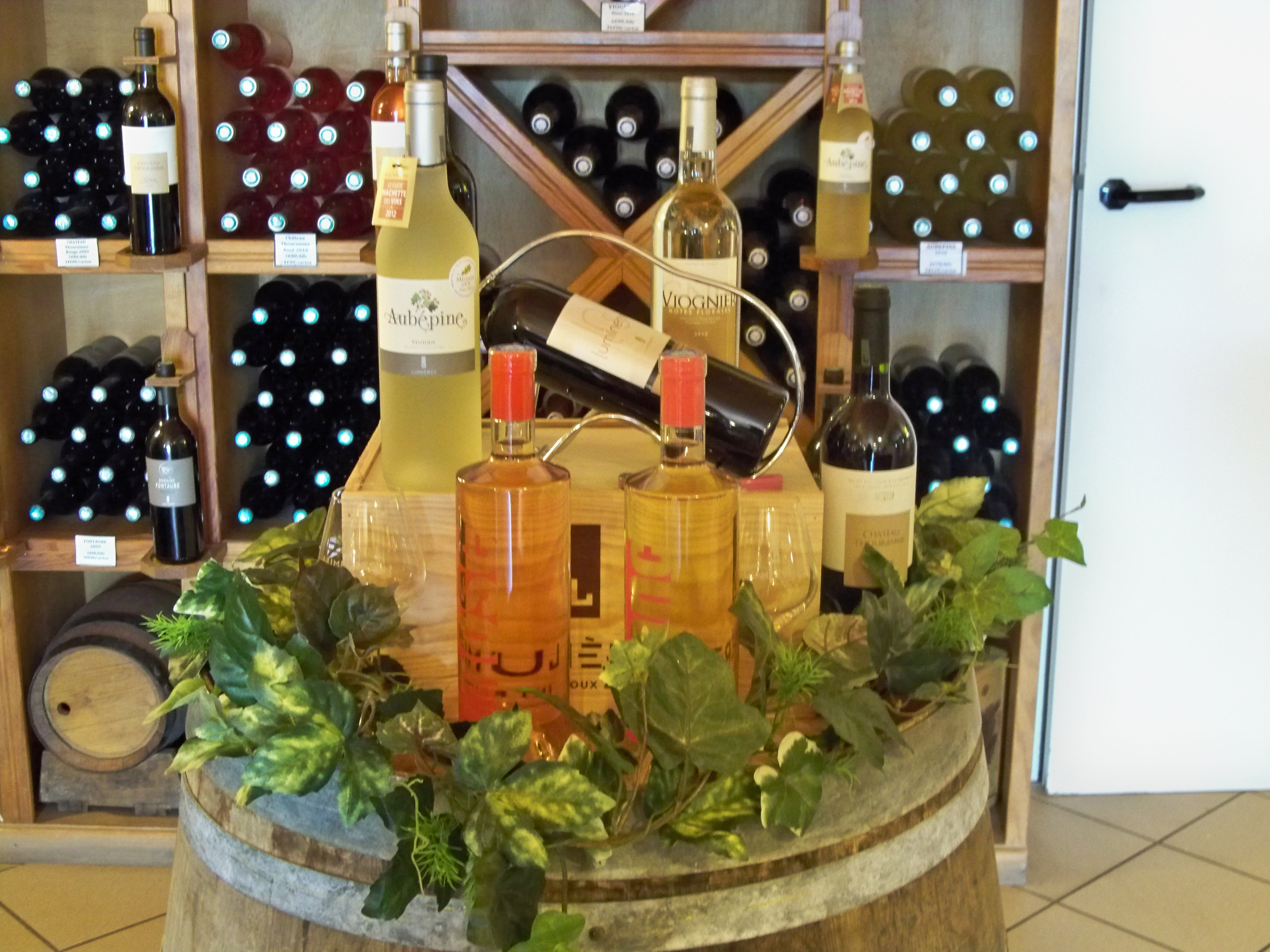 Diverses bouteilles de la cave de Lumières - Ventoux AOC